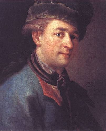 Портрет молодого человека в голубом кафтане (Автопортрет?). Государственная Третьяковская галерея